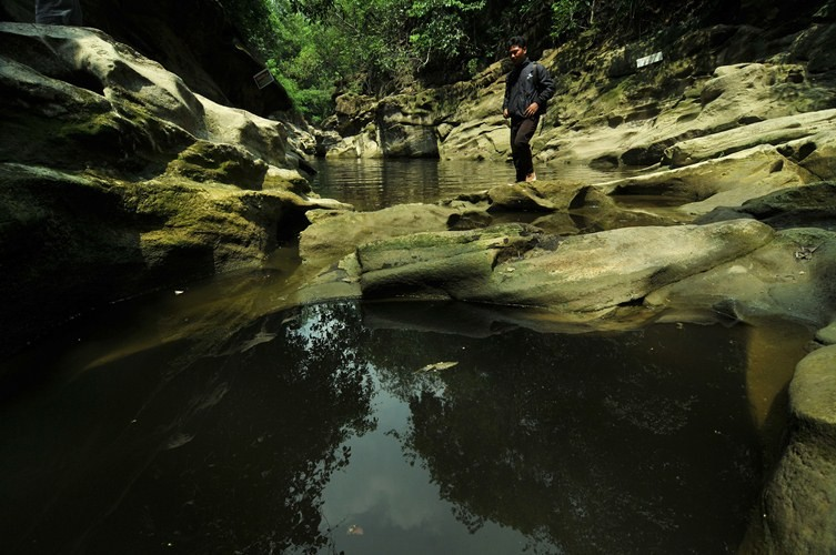 Kedung Cinet wisata ngarai di Jombang, Jawa Timur